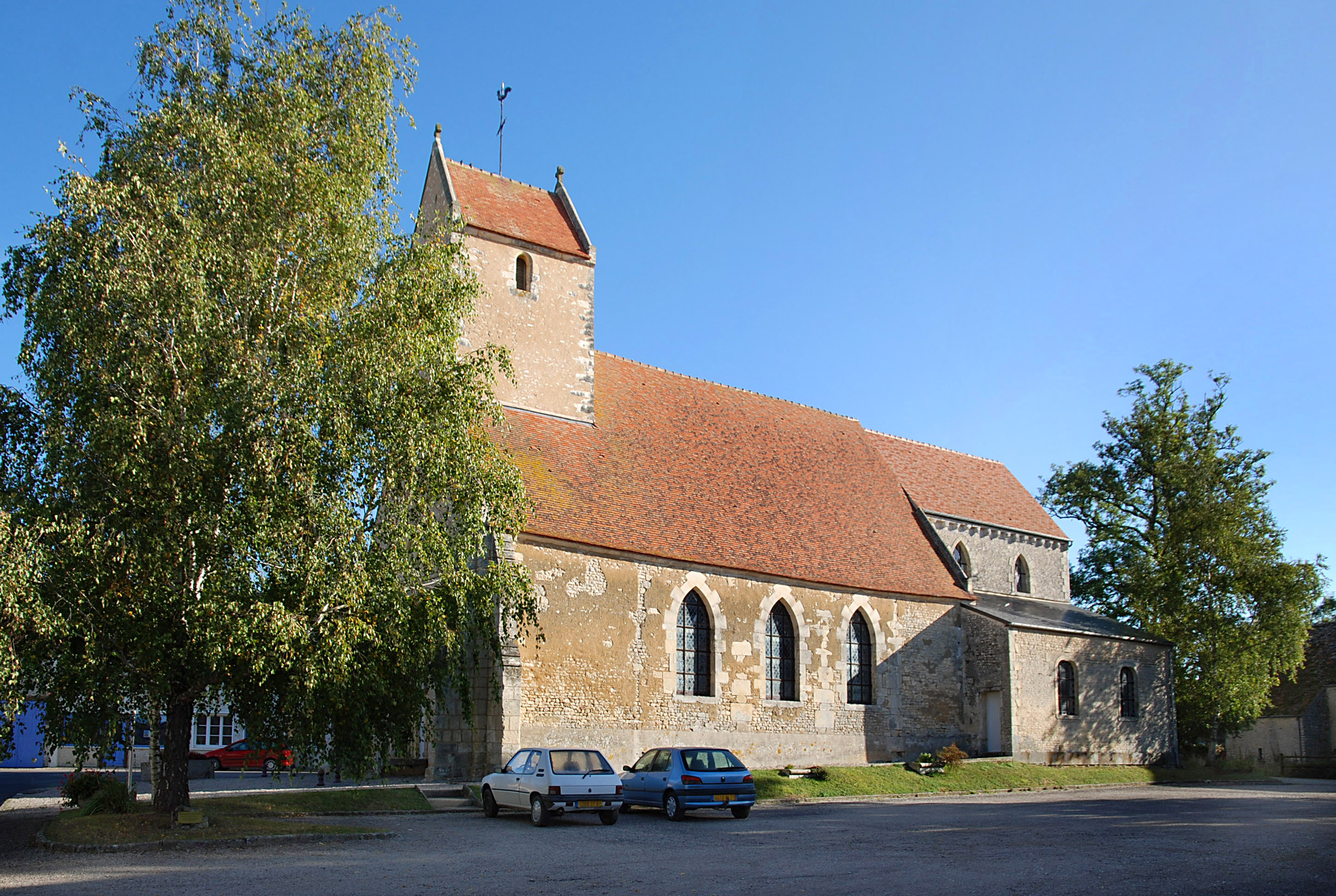 Église Saint-Gervais et Saint-Protais de Neuvy-au-Houlme (Orne)